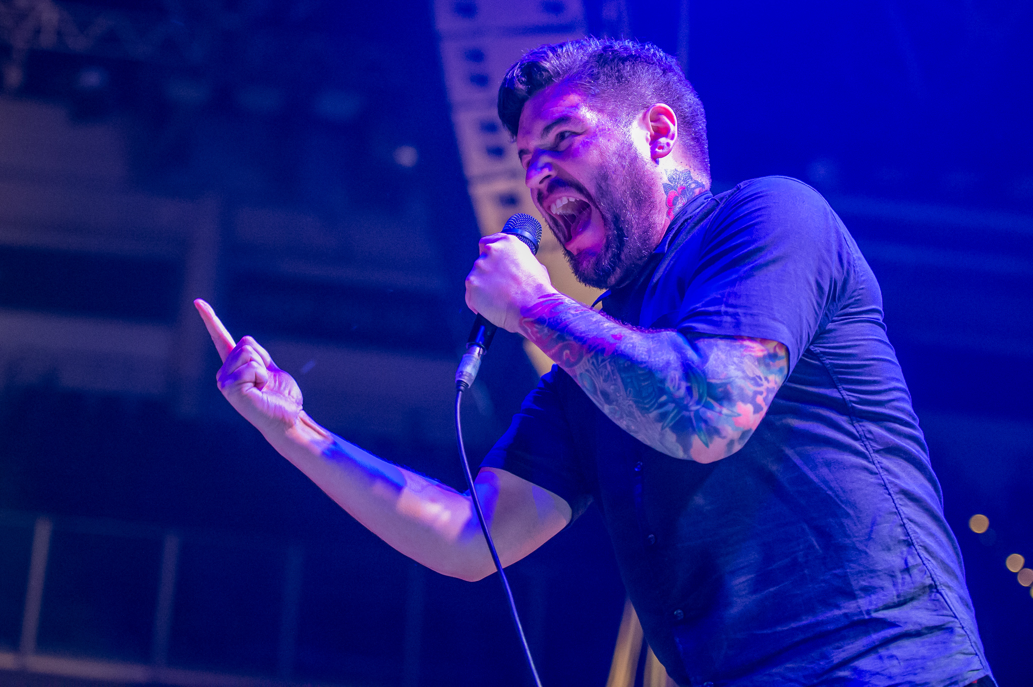 ARGO-Konzerte,Arena Nürnberger Versicherungen,Clubstage,Hernan "Eddie" Hermida,Konzert,Livekonzert,Livemusik,Musik,RiP,Rock im Park 2014,Suicide Silence